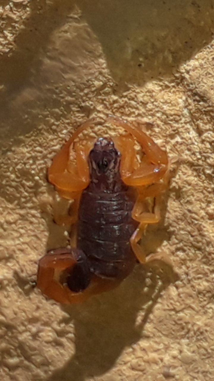 Un Escorpión de Hueque (Tityus Falconensis), especie endémica de Falcón, Venezuela. El espécimen fue fotografiado en la península de Paraguaná.